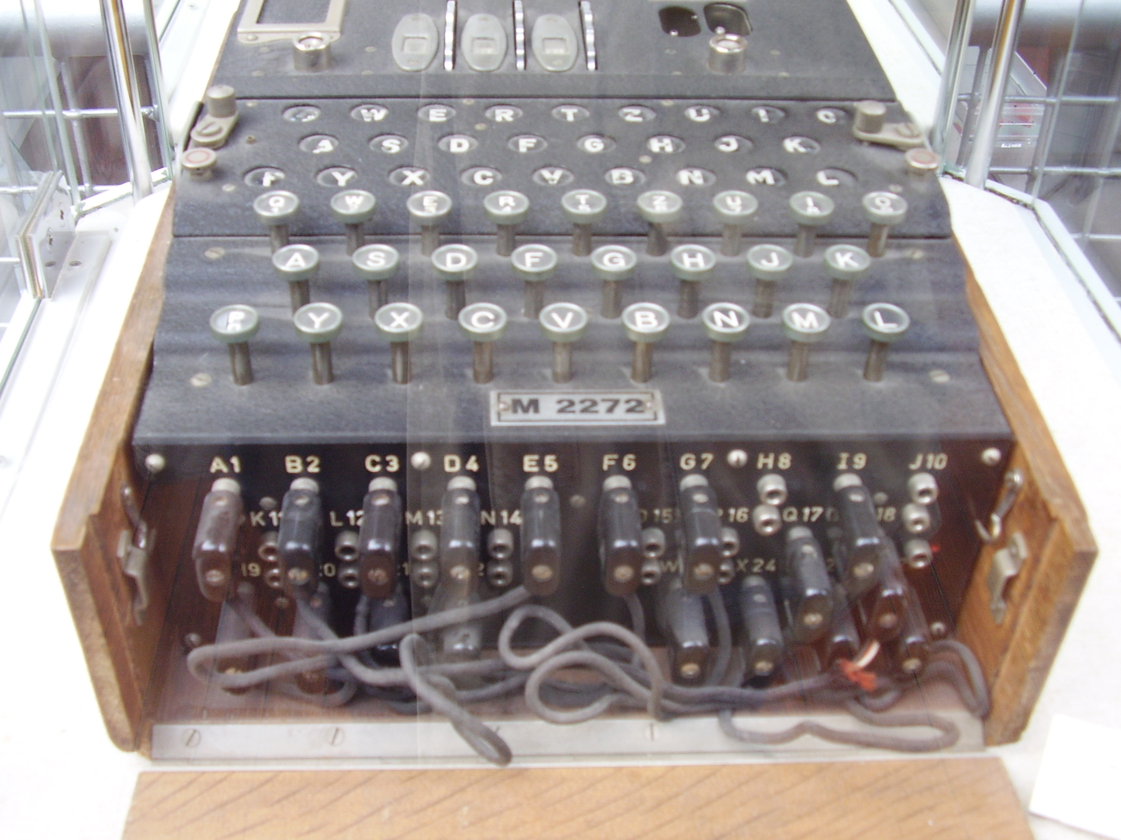 Drei Walzen Enigma mit Steckerbrett Bei der Kriegsmarine nur bis 1.2.1942 im Einsatz Aufgenommen im Aeronauticum in Nordholz